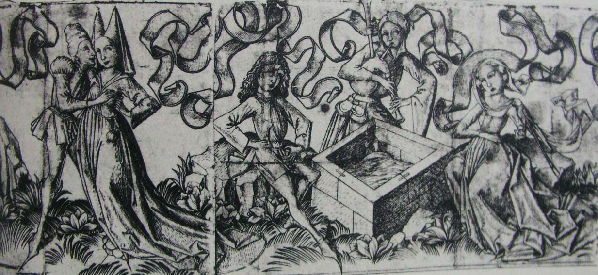 Zwei Paare im Liebesgarten L.207 rechts ein Stück mit einem dritten Paar abgeschnitten